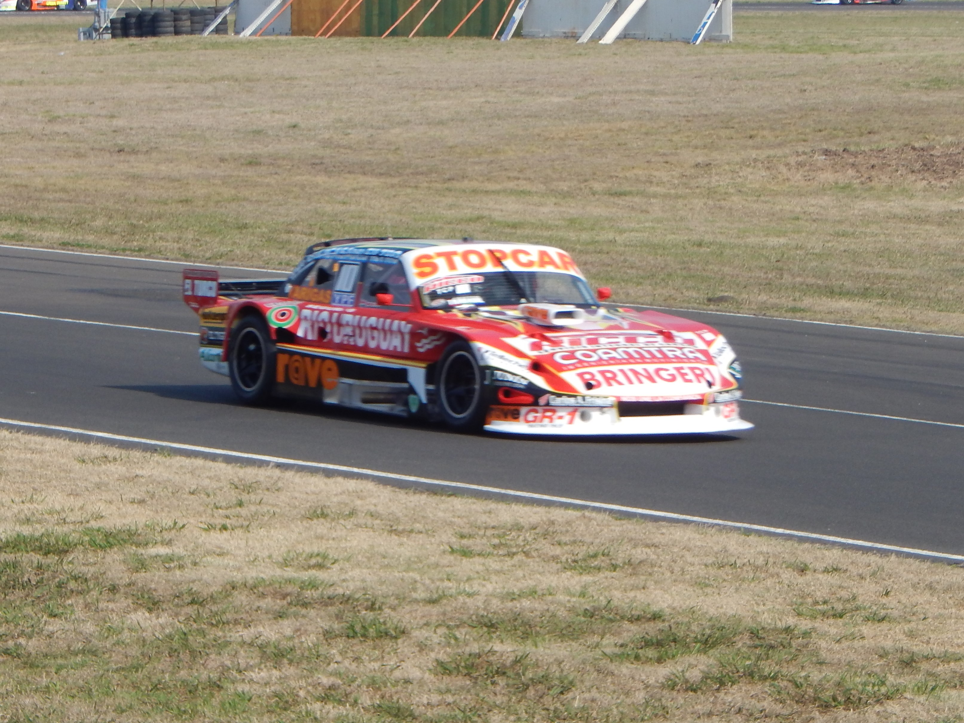 Federico Pérez PC Pista en Paraná 2015